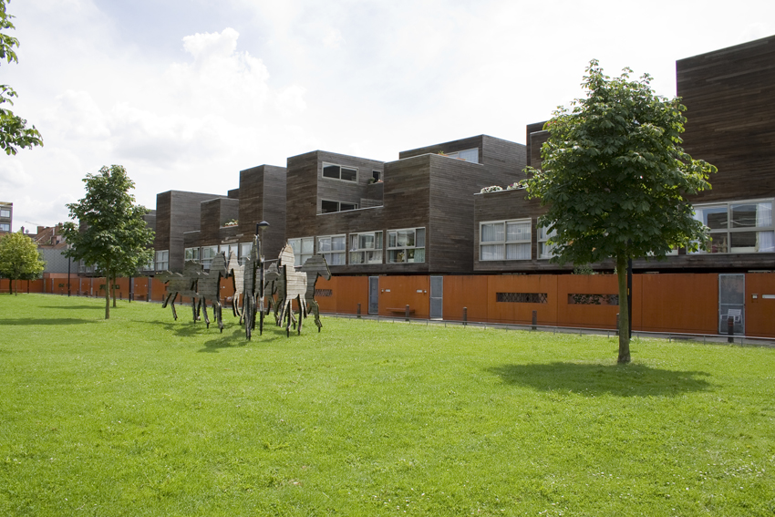 De voormalige kazerne Cdt. Jonkheer de Hollain